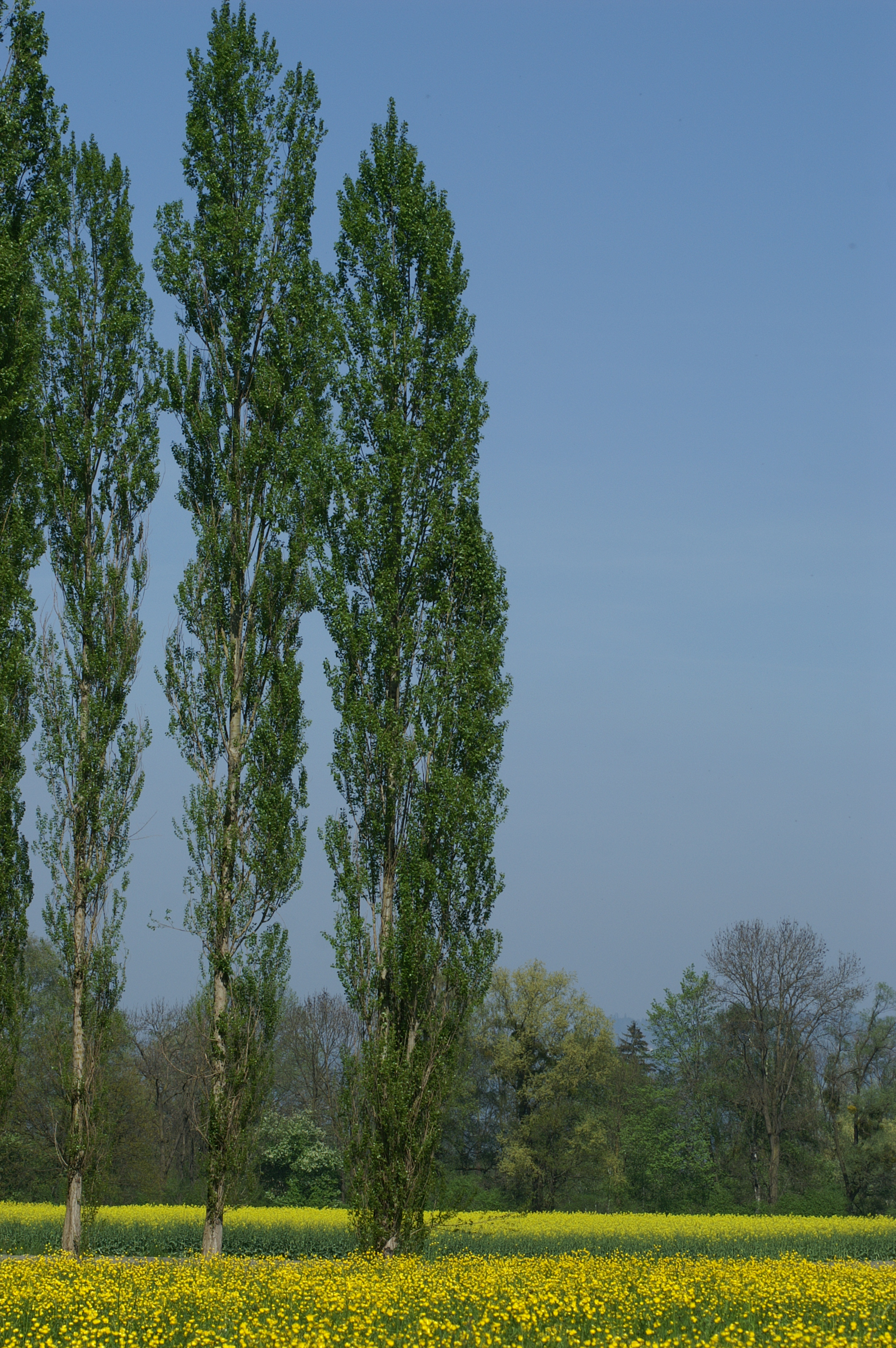 Pyramidenpappel, Säulenpappel oder Italienische Pappel (Populus nigra 'Italica' or 'Plantierensis')